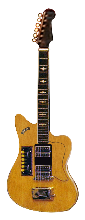 Eko 400 Ekomaster hazelnut 4V (c.1962) Music Ground, 27 Denmark Street, Covent Garden, London